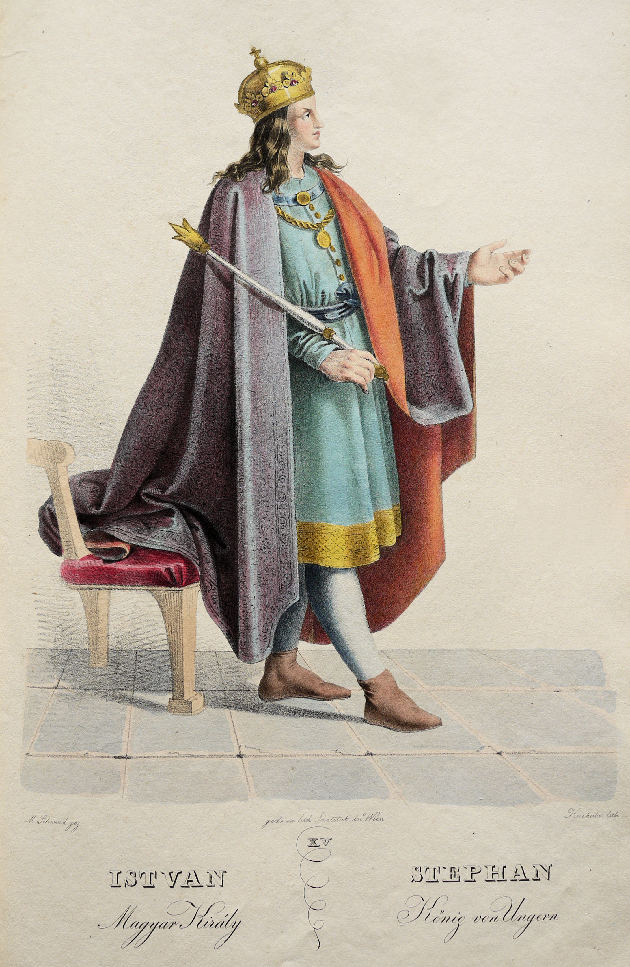 Stephan IV. (1133-1165), König von Ungarn etc. Lithographie von Josef Kriehuber nach einer Zeichnung von Moritz von Schwind aus Ungerns Erste Heerführer Herzoge und Koenige In einer Reihe von Bildnissen von Bela bis auf Seine Majestät Franz I. Kaiser Von Österreich König Von Ungern &c., &c. Wien : Lithographisches Institut ;ca. 1828